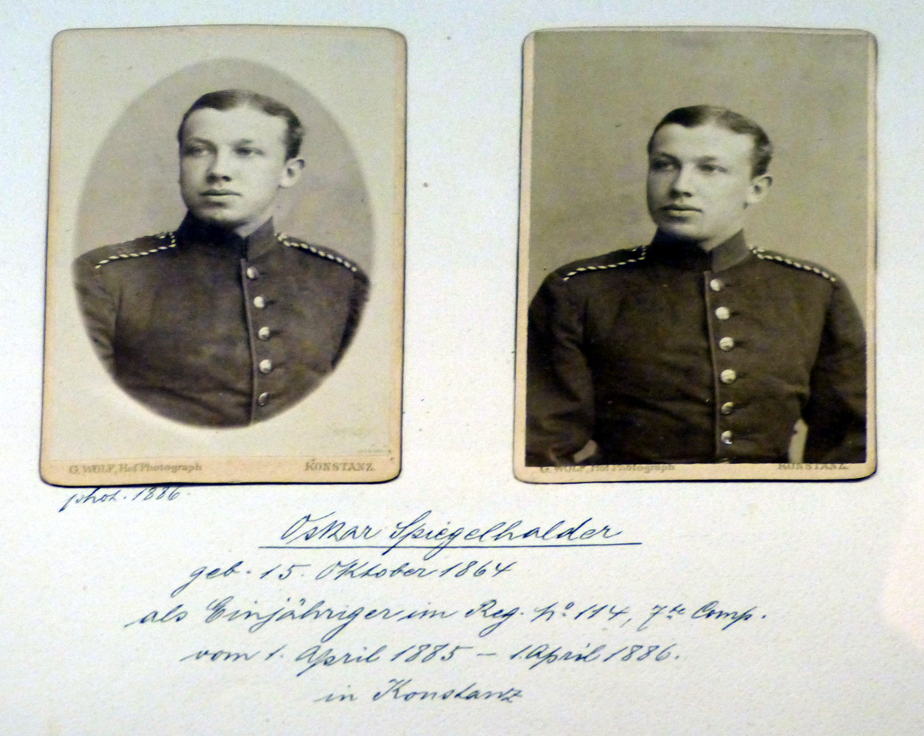 Franziskanermuseum Villingen, Baden-Württemberg